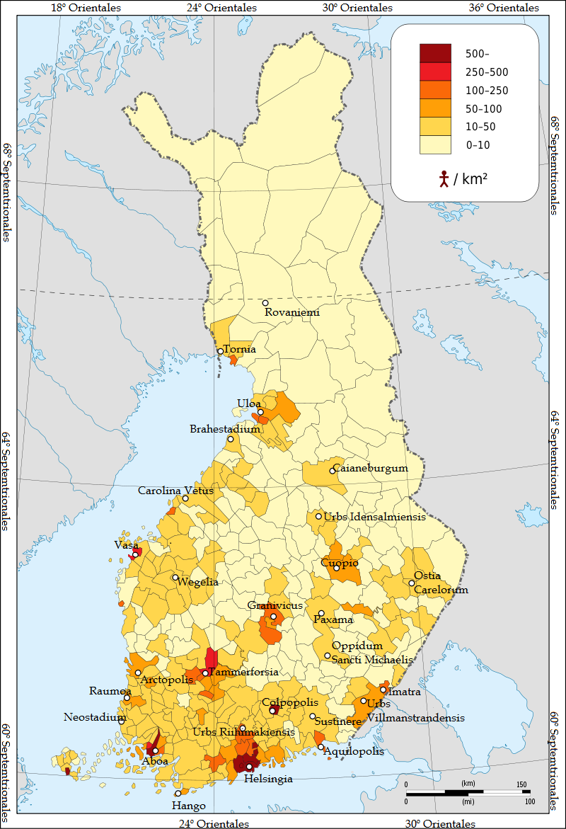 Tabula populositatis Finniae